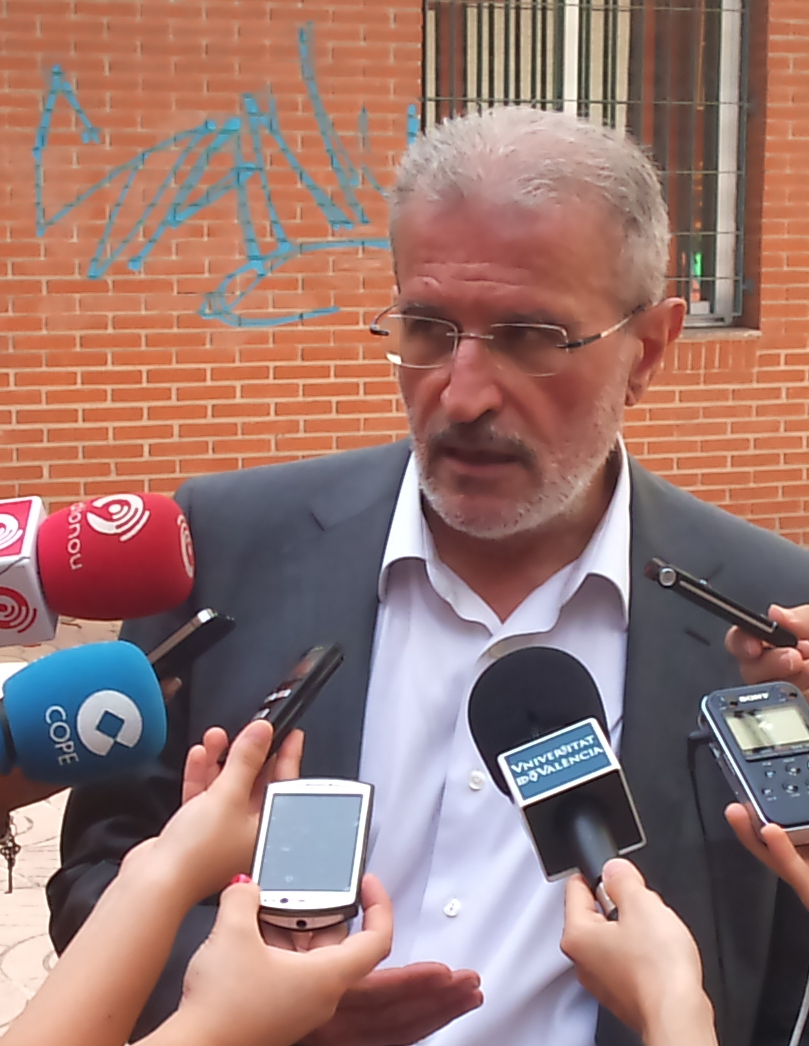 El Rector de la Universitat de València Esteban Morcillo es entrevistat després d'una visita al centre d'idiomes de la UV amb Alberto Fabra i Maria José Català.